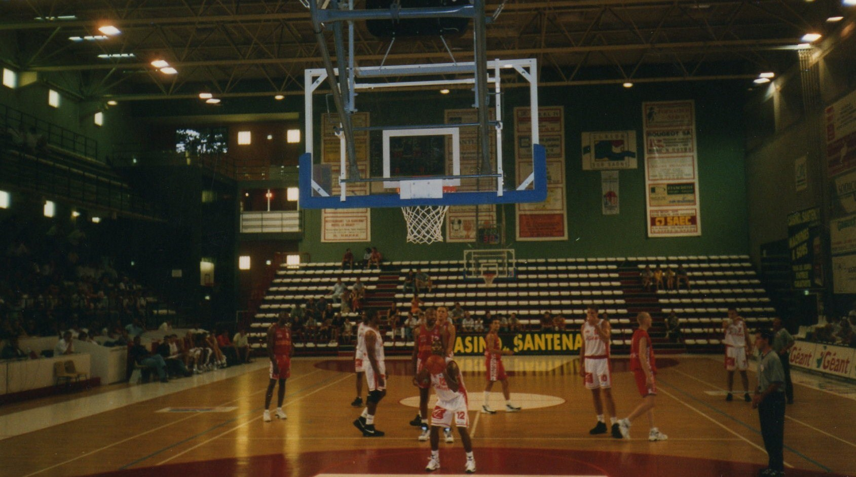 Match amical à la Maison des Sports de Chalon-sur-Saône entre l'Elan Chalon et le SLUC Nancy (aout 1997)